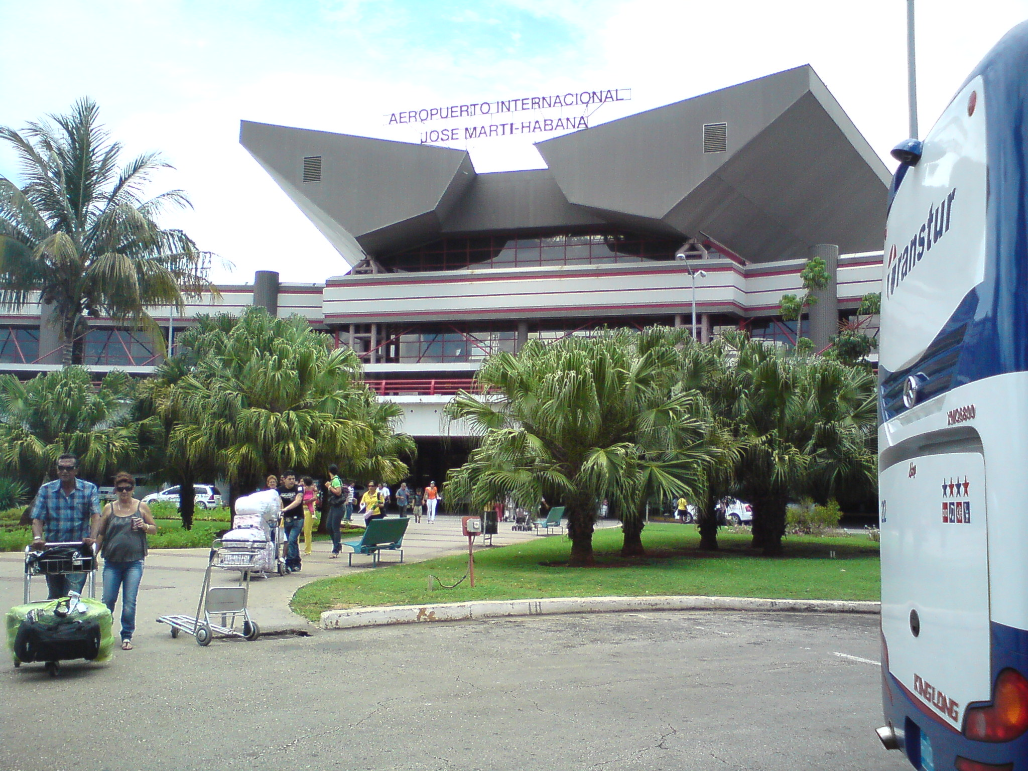 Vista de la Fachada del Aeropuerto Internacional José Martí en La Habana-Cuba